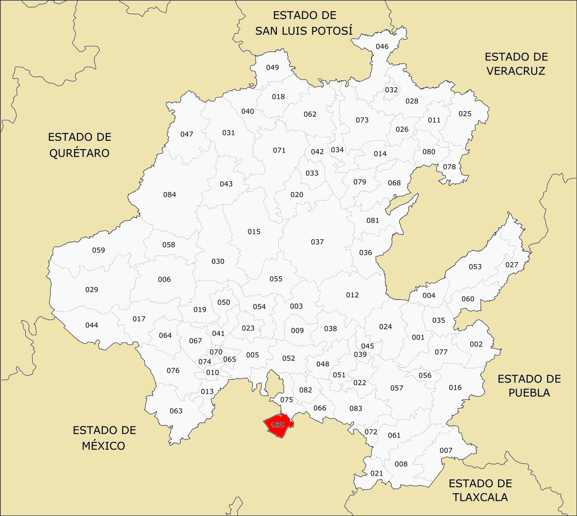 Municipios de Hidalgo